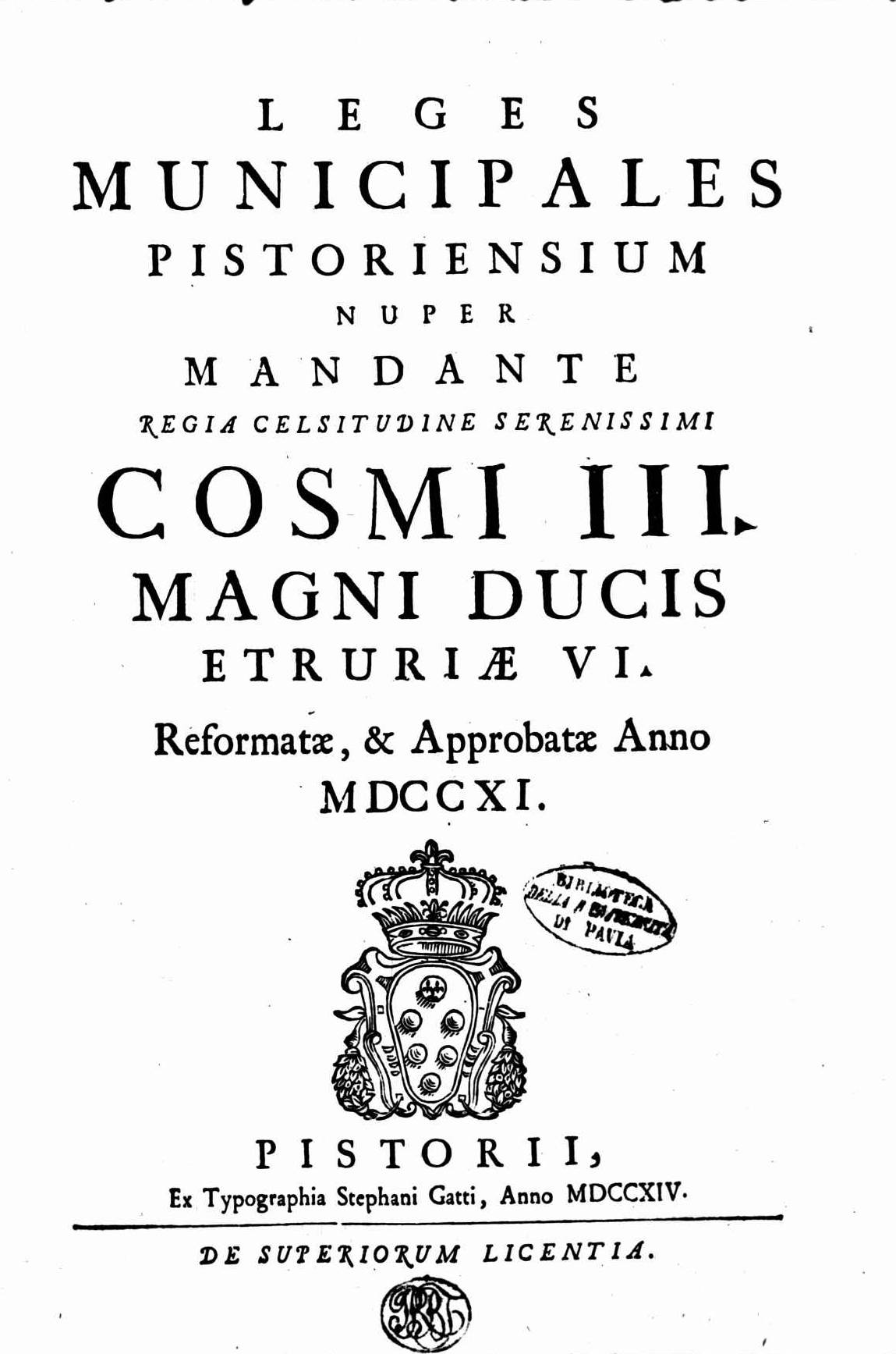 Frontespizio